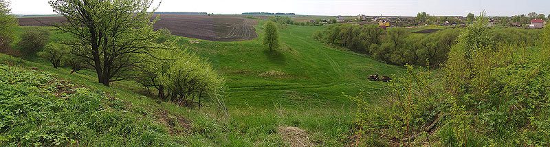 Від з паўднёвага вала на тэрырыторыю селішча на поўдзень ад гарадзішча